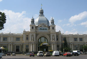 Головний залізничний вокзал у Львові. Автори проекту В. Садловський, архітектурно-будівельна фірма Івана Левинського (1899-1904)